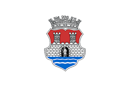 Српски (ћирилица): Застава Панчева